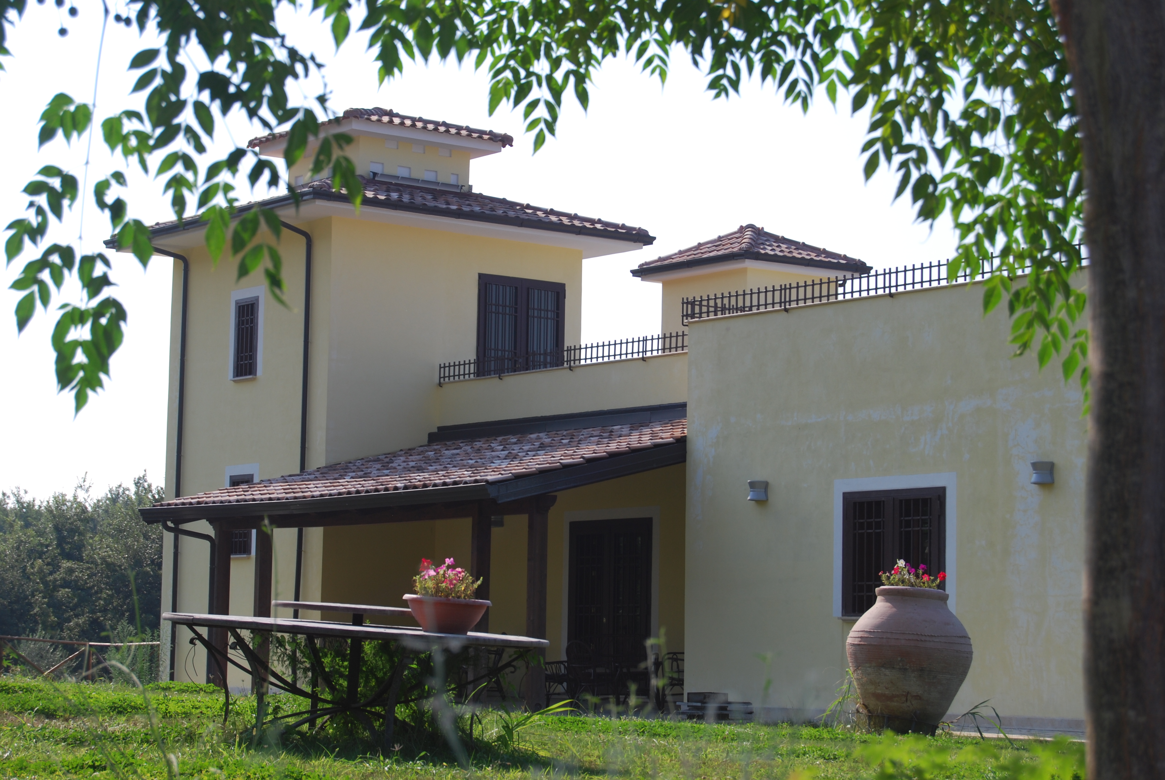 Villa Delle Muse